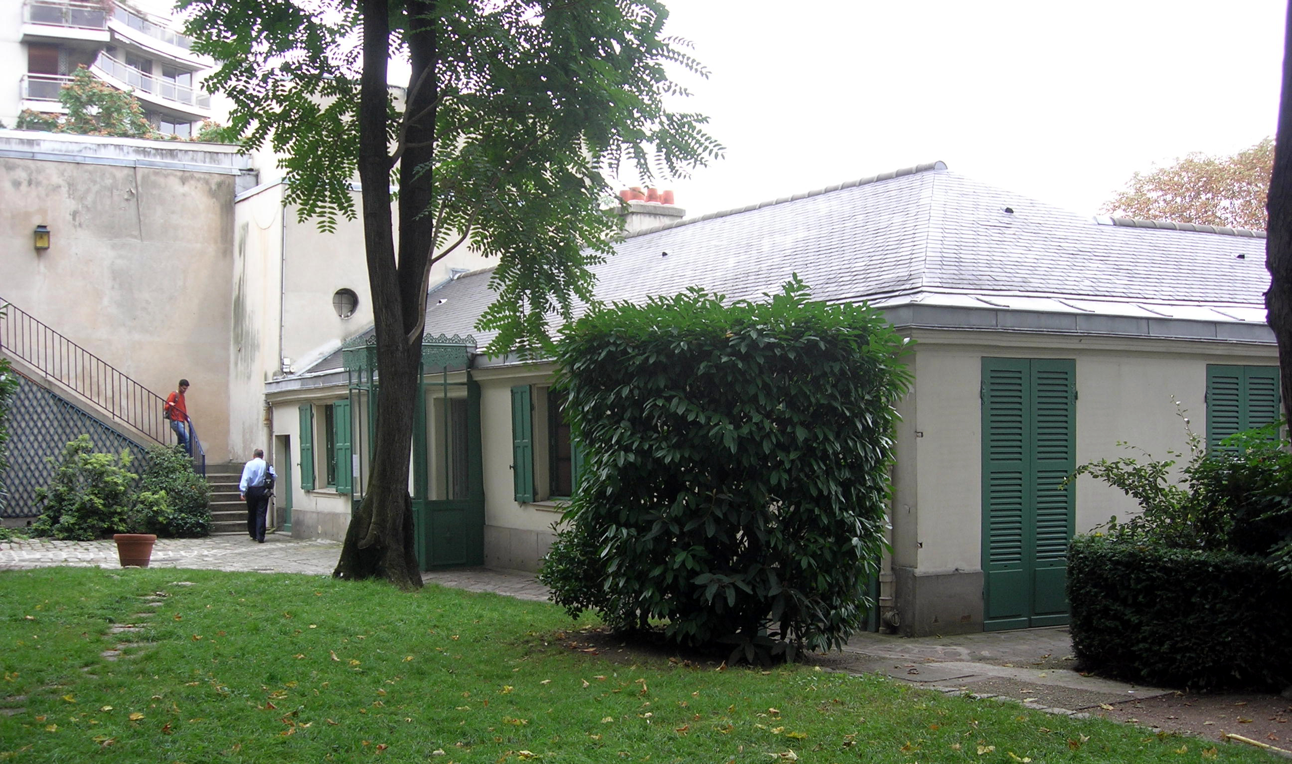 Description =Maison de Balzac à Paris dans le XVIe arrondissement Source =Photo taken by Remi Jouan Date =Septembre 2006 Author =Remi Jouan